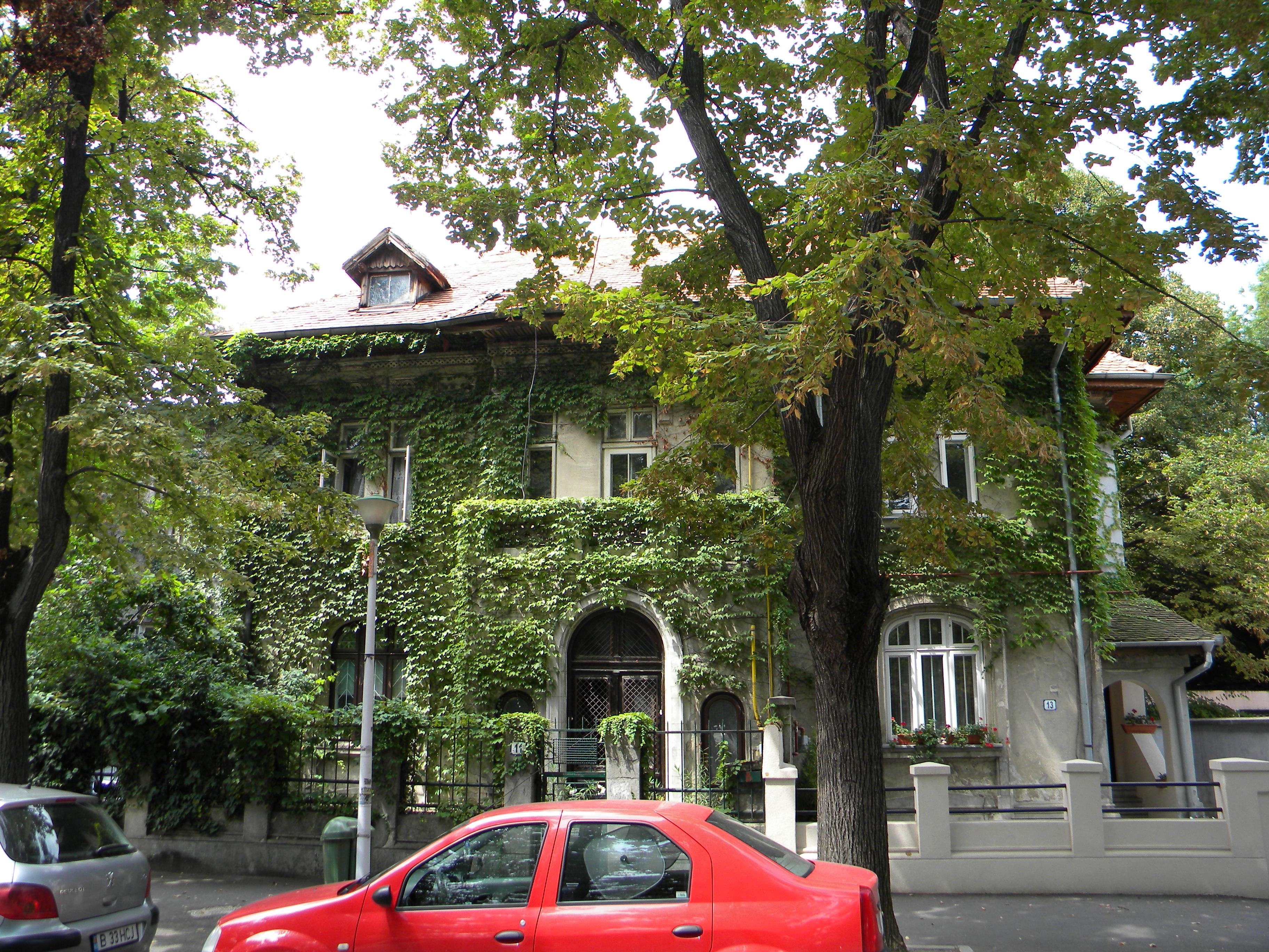 Imobil pe Bd. Aviatorilor, nr. 11, Bucuresti sect. 1